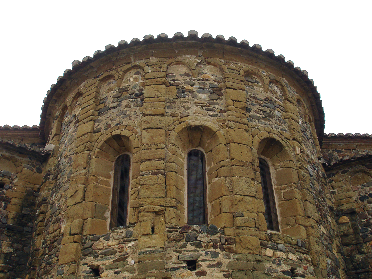 Monestir de Sant Miquel de Cruïlles (Girona, Catalunya, Espanya)